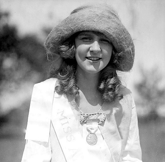 Margaret Gorman